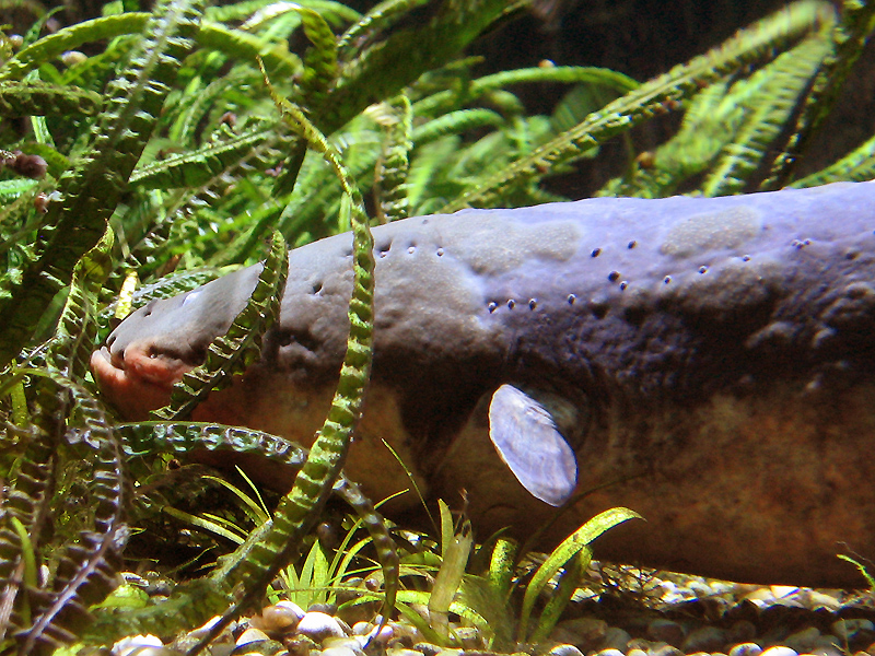 Electrophorus electricus, Gesamtansicht; eigene Aufnahme.